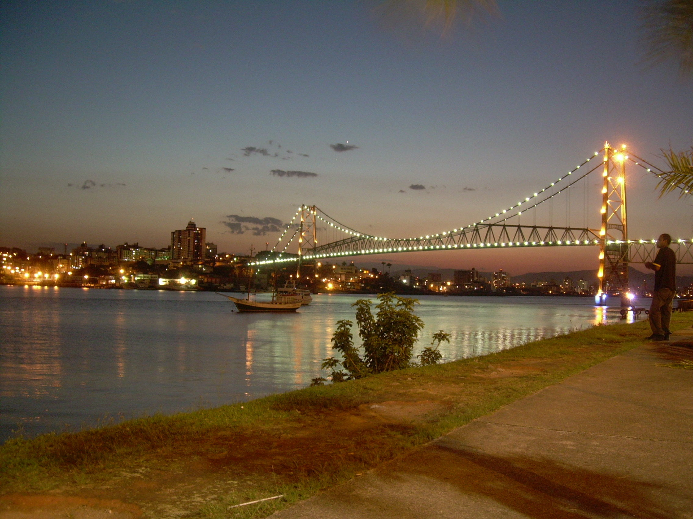 Ponte hercilio luz a noite em Florianópolis